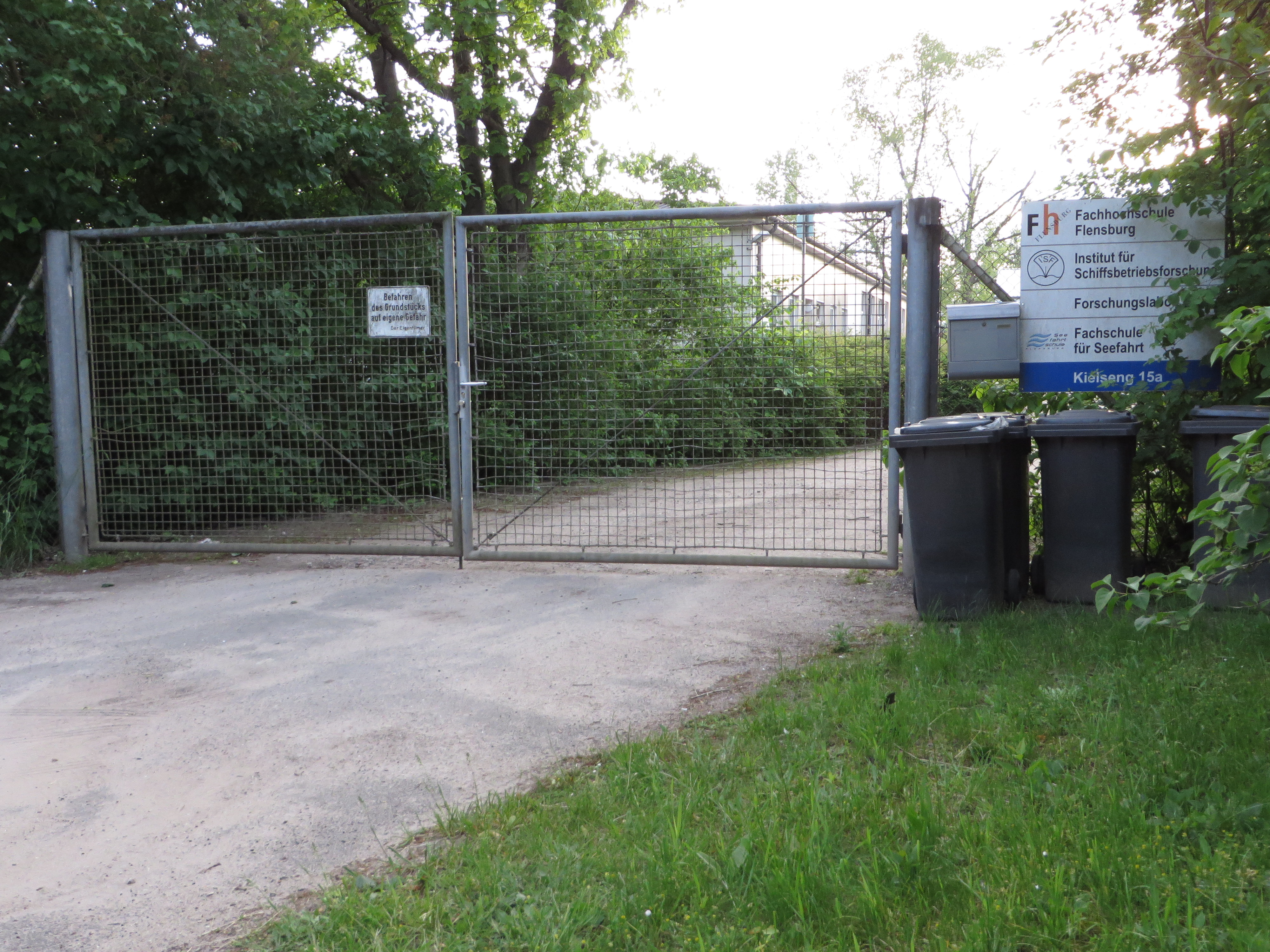 Fachhochschule Flensburg Schiffsbetriebsforschung Kielseng 15a, Bild 03